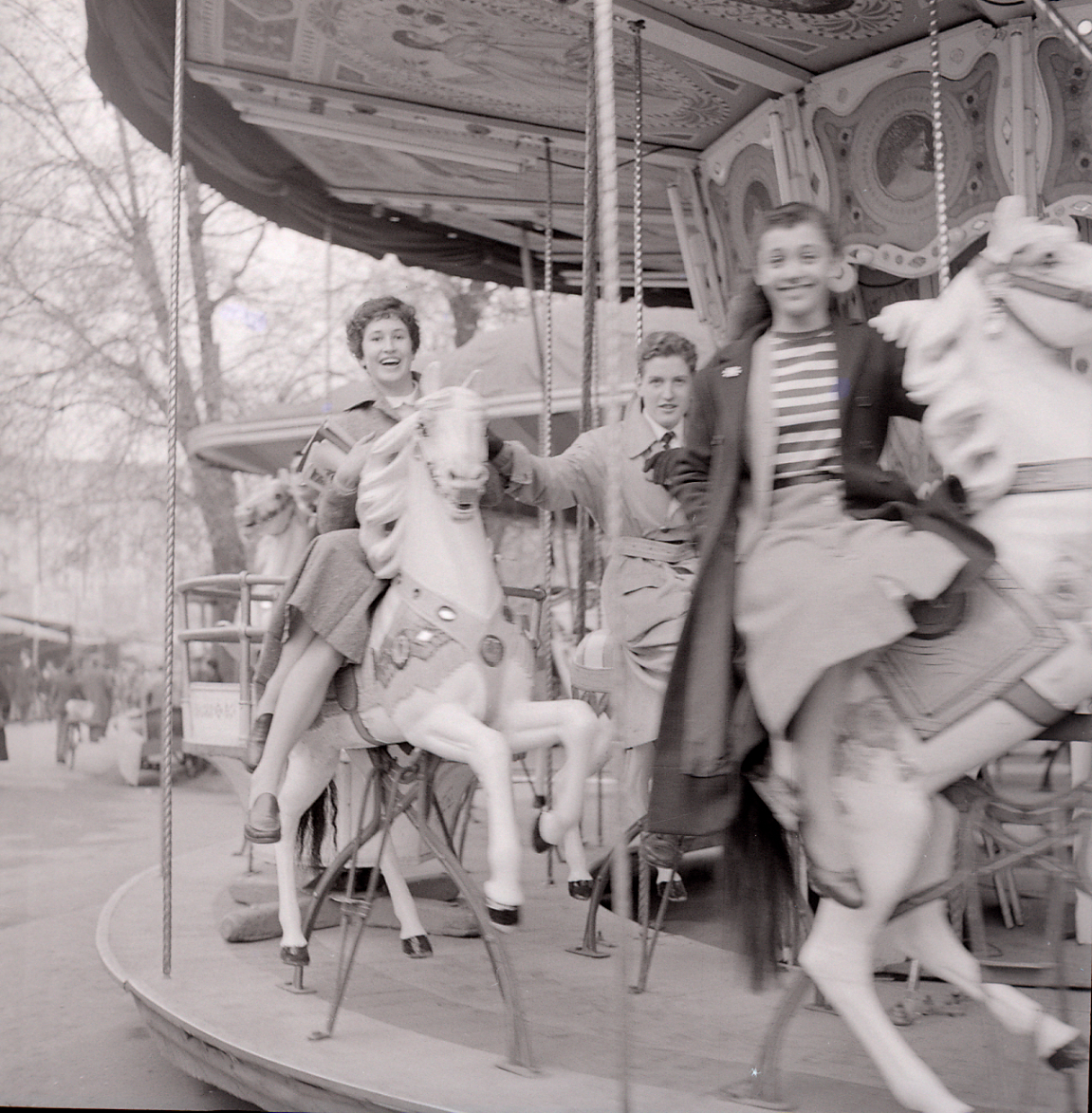 Le attività ricreative dei giovani dentro e fuori casa documentate per la rivista L'Illustrazione Italiana. Servizio fotografico : Milano, 1962 / Paolo Monti. - Buste: 1, Fototipi: 72 : Negativo b/n, gelatina bromuro d'argento/ pellicola ; 6x6. - ((Serie costituita da 72 negativi identificati con i nn.: 11830-11902. Sulla busta manoscritto: "Illustrazione/ Italiana". La suddetta serie è contenuta nella scatola identificata con la numerazione R11758-121757. Sulla scatola manoscritto a pennarello nero: "Varie". - Occasione: Servizio realizzato per la rivista "Illustrazione Italiana" sulle attività ricreative dei giovani dentro e fuori casa.